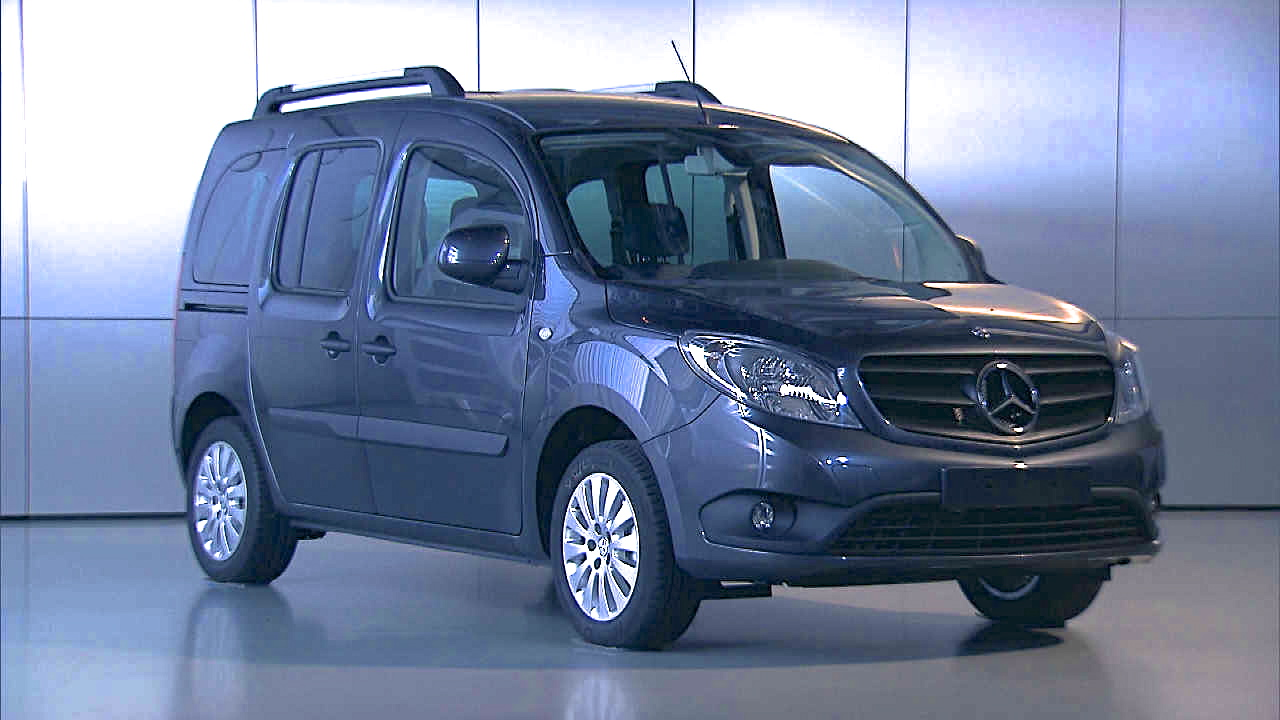 Citan